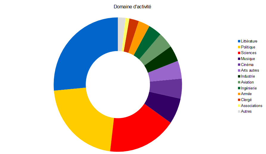 Diagramme circulaire représentant le domaine d'activité des personnalités qui ont donné leur nom à une ou plusieurs voies de Saint-Priest.